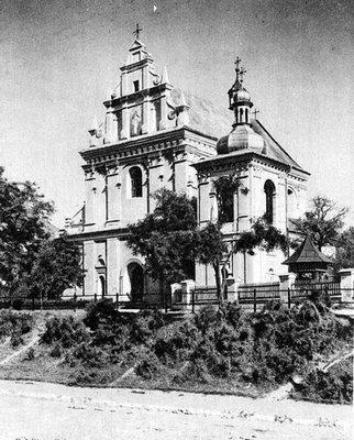 Lublin - Kościół pw. Św. Agnieszki